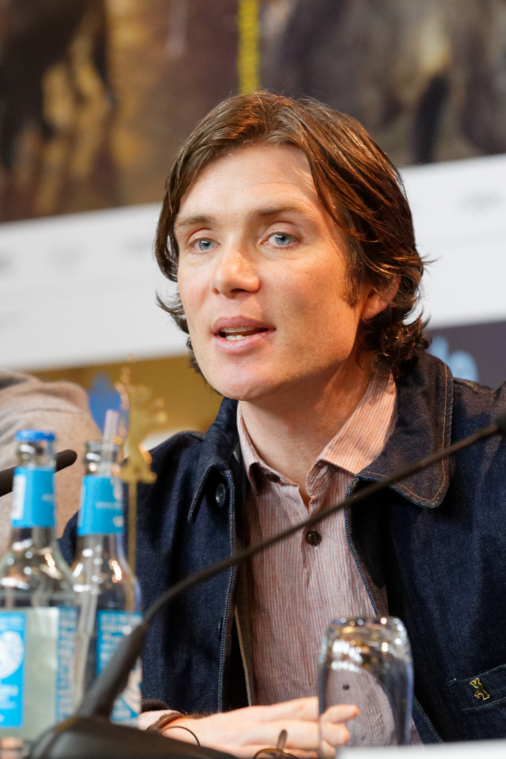 Cillian Murphy bei der Pressekonferenz zu The Party bei der Berlinale 2017